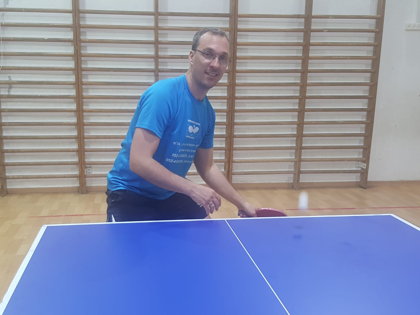 יניב שרון בעת חבטת כף יד